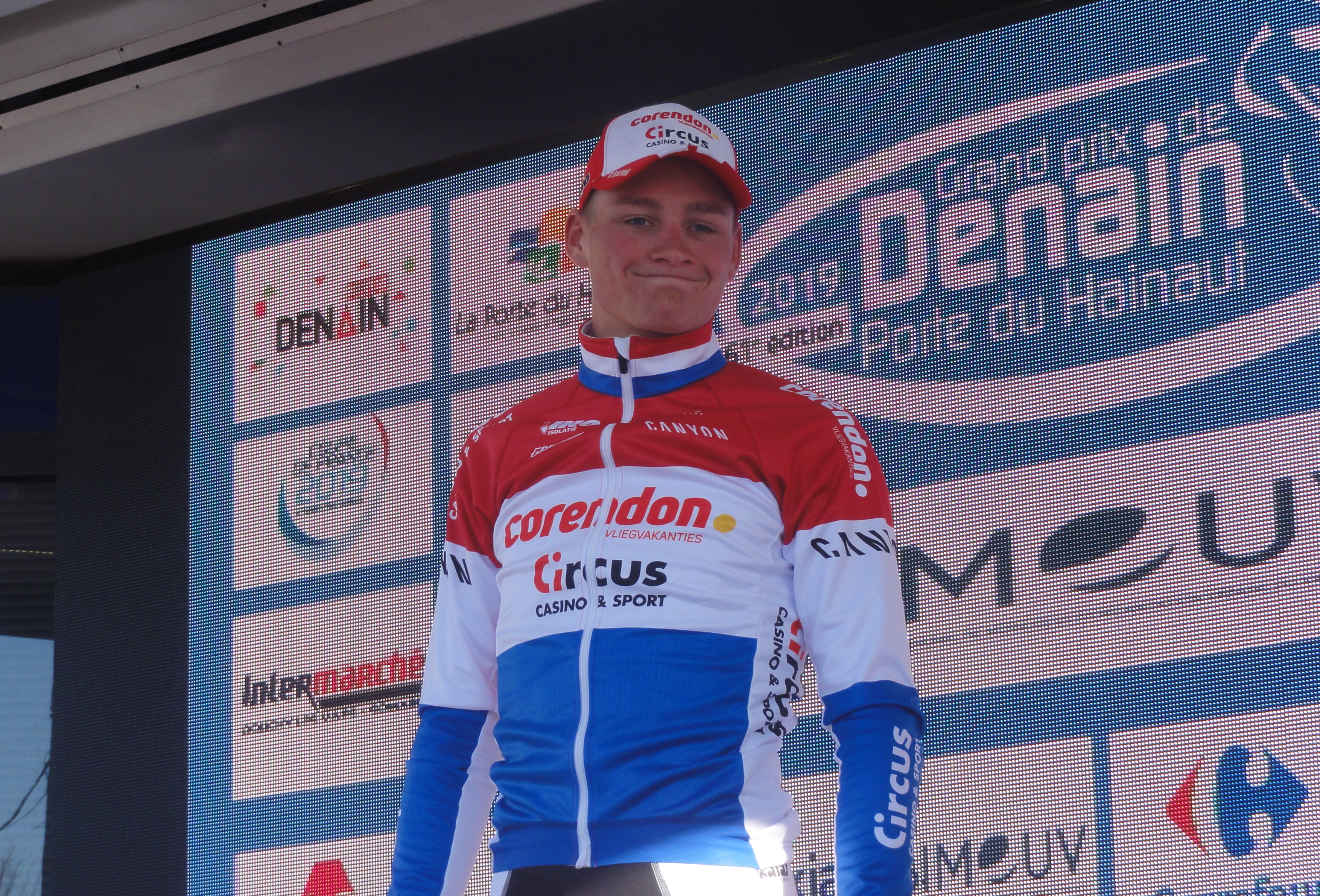 Reportage réalisé le dimanche 24 mars à l'occasion du départ et de l'arrivée du Grand Prix de Denain 2019 à Denain, Nord, Nord-Pas-de-Calais-Picardie, France.